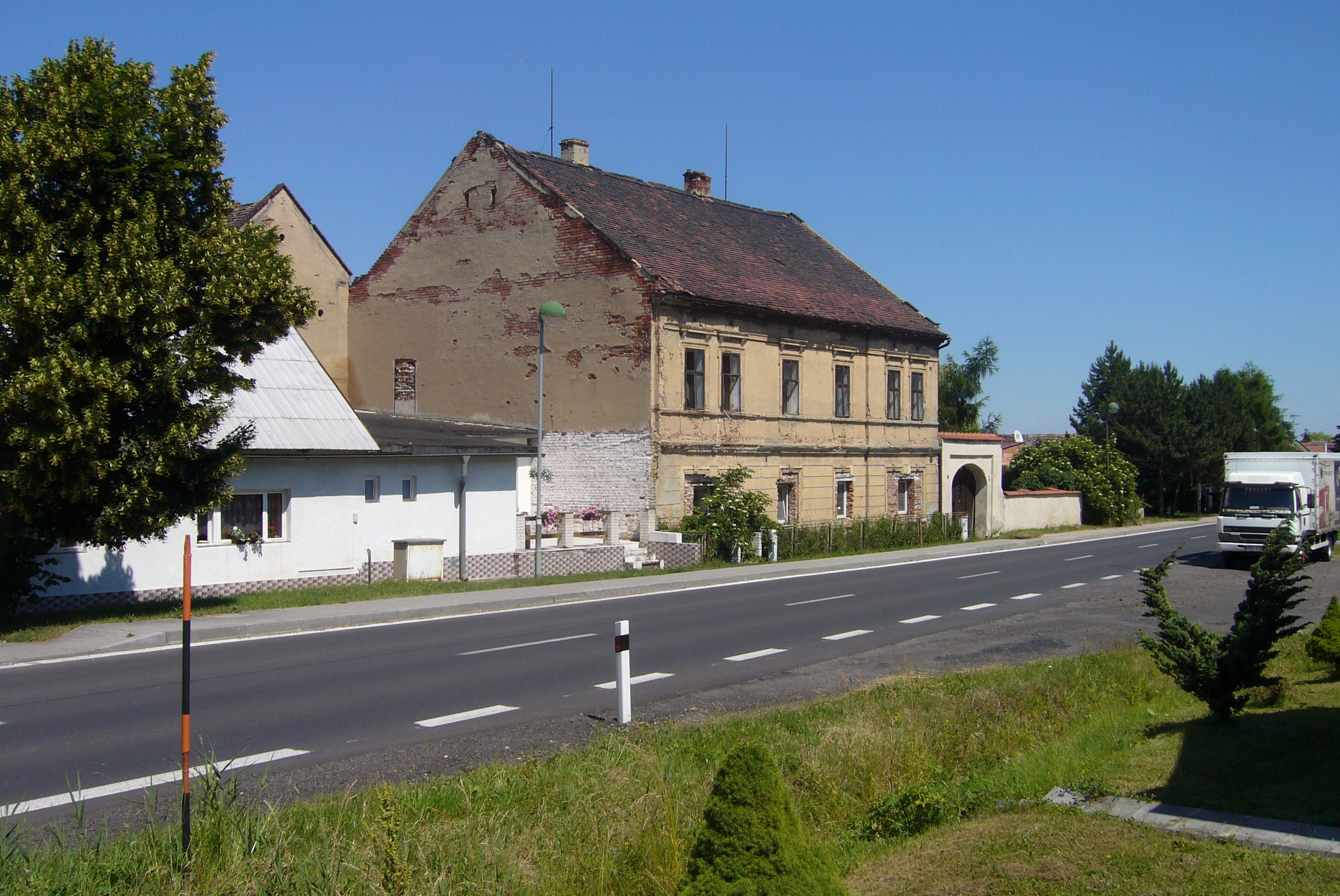 Dům u silnice